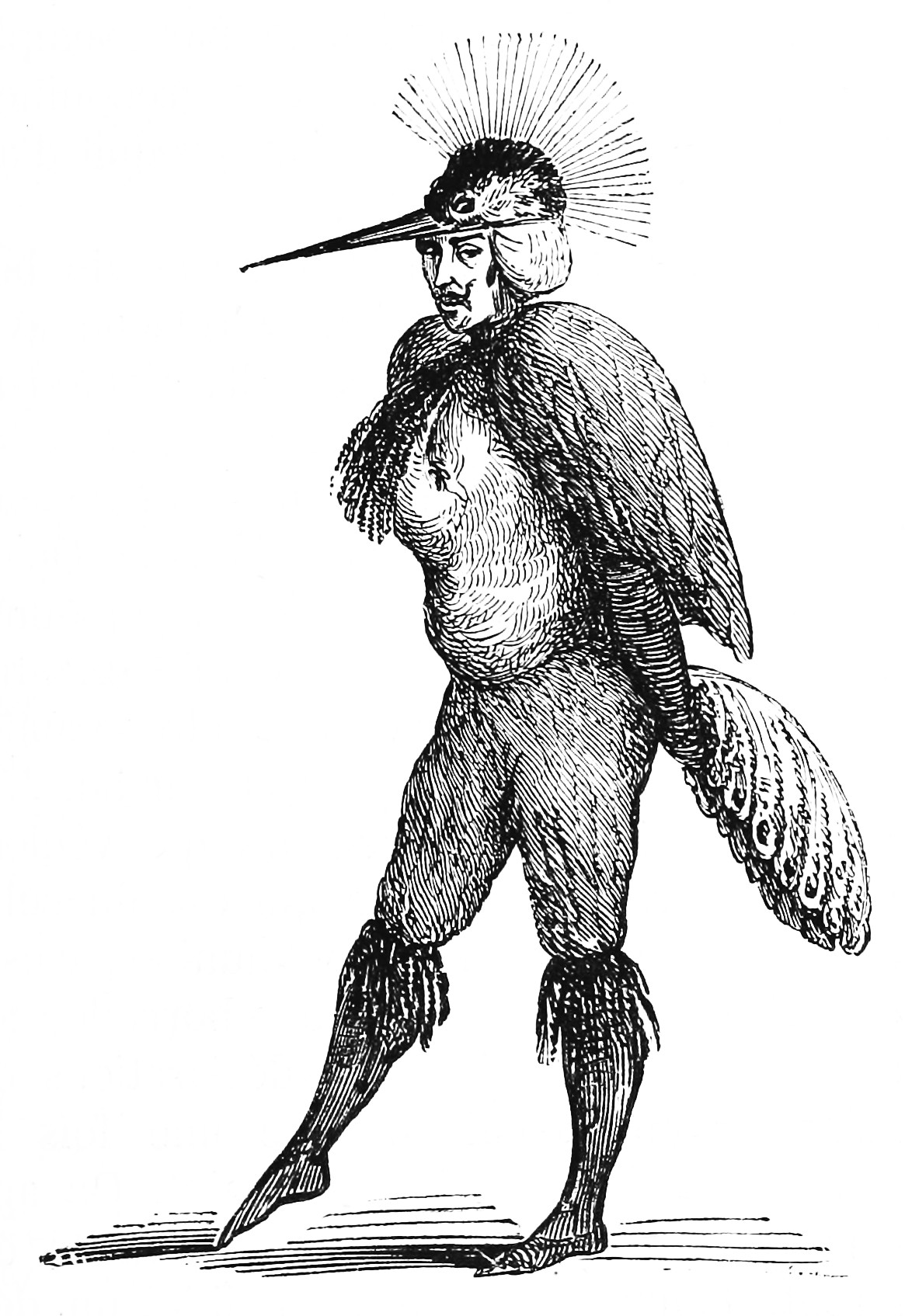 Illustration du Dictionnaire infernal de Jacques Auguste Simon Collin de Plancy par Louis Le Breton, 6eme édition, 1863.